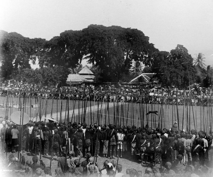 Repronegatief. Een tijgergevecht, Kediri